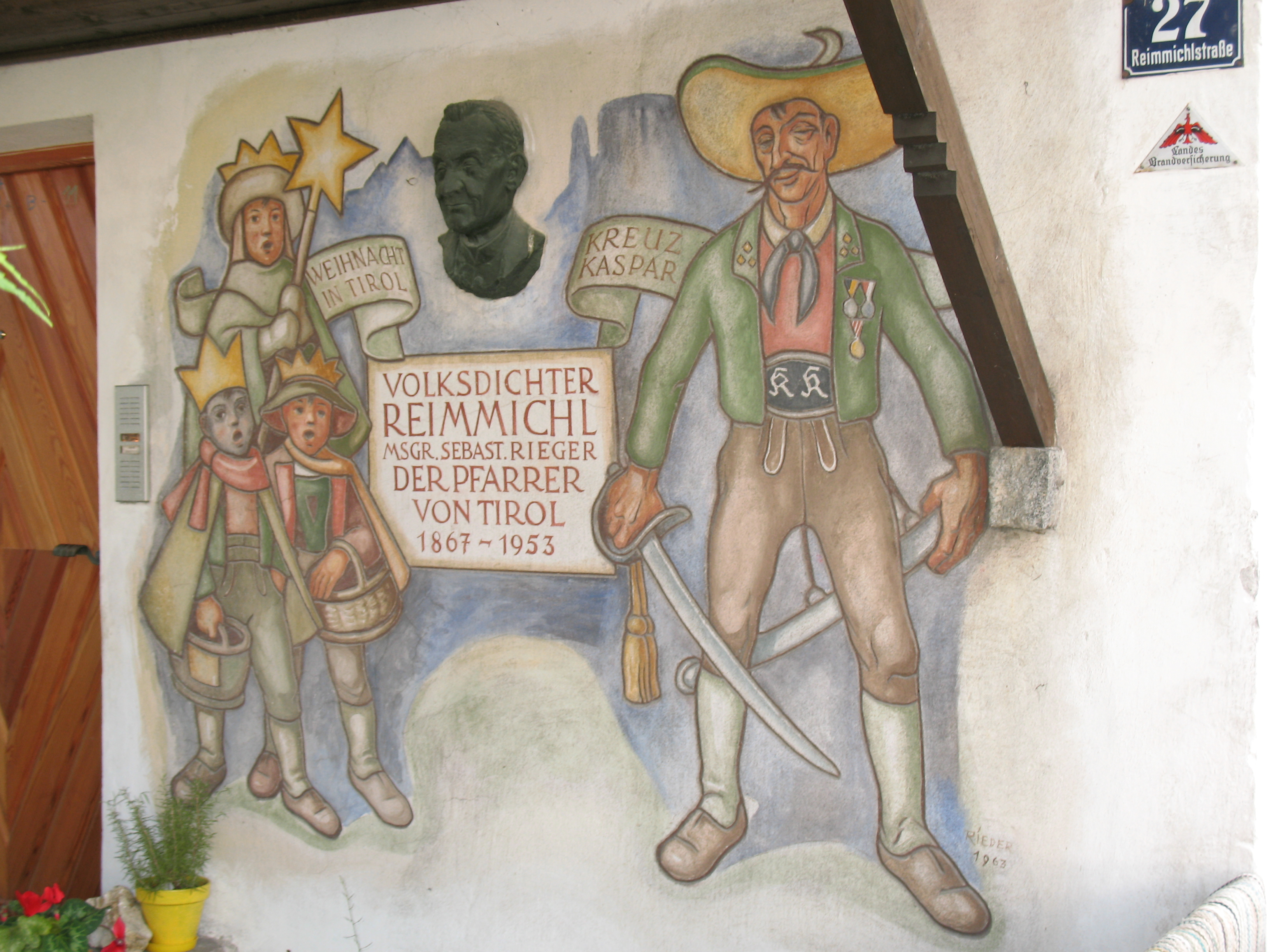 Ehem. Widum Heiligkreuz, Reimmichl- Haus, Wandbild